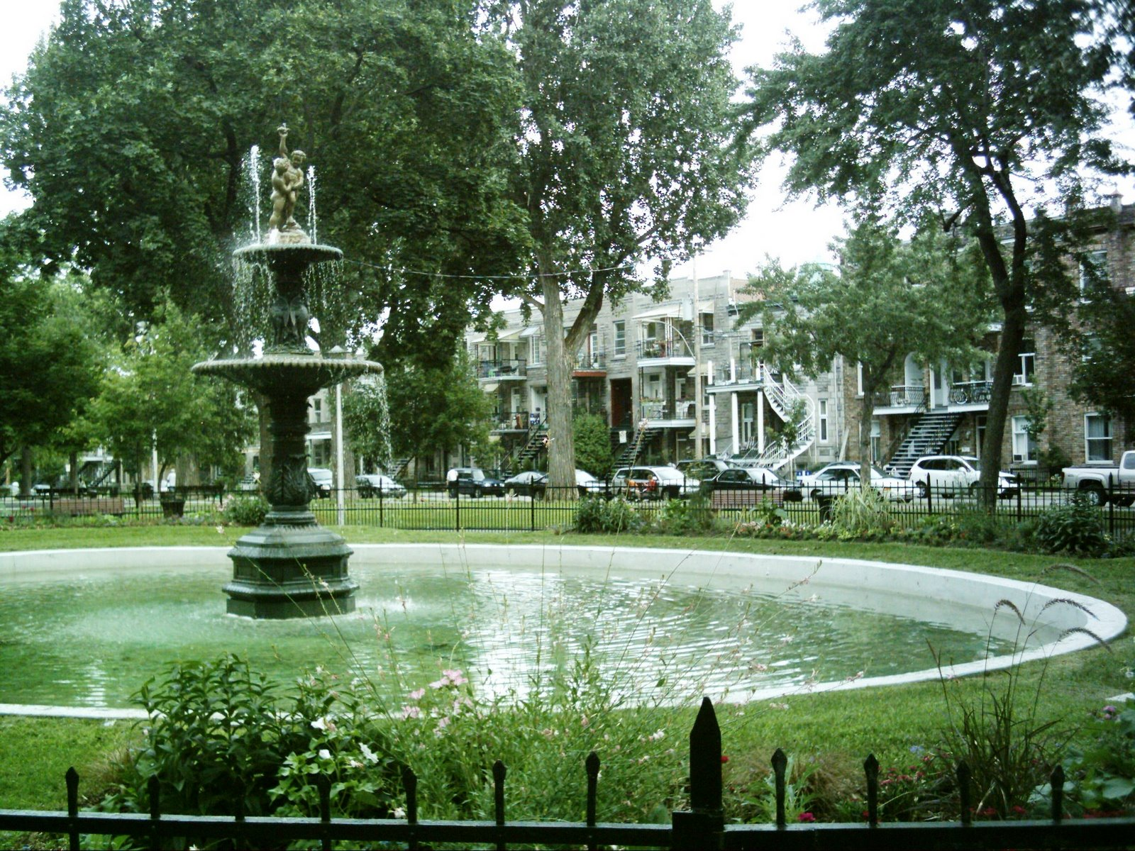 Vue de la fontaine au coeur du Parc George-Étienne-Cartier